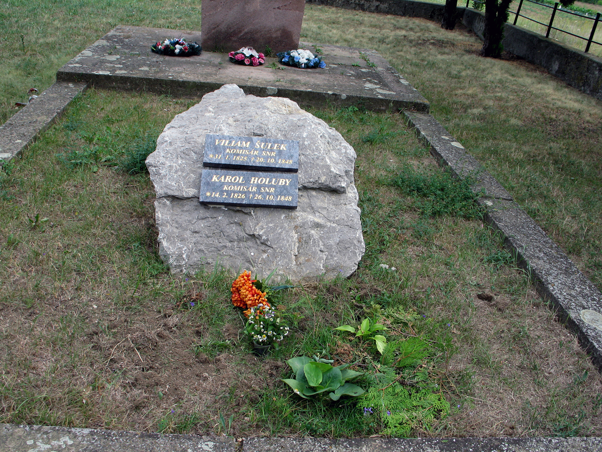 Súčasť pamätníka K. Holubyho a V. Šuleka